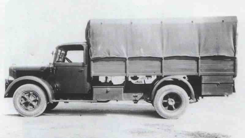 autocarro medio